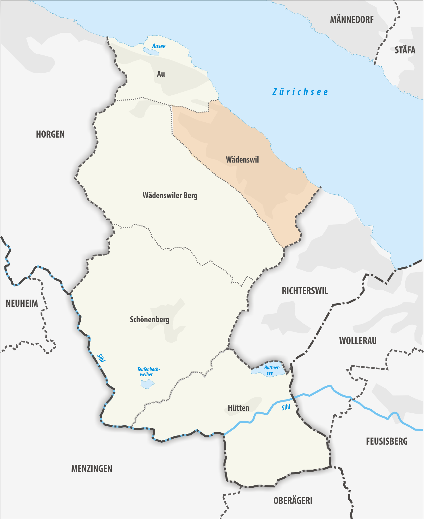 Wädenswil-Wädenswil